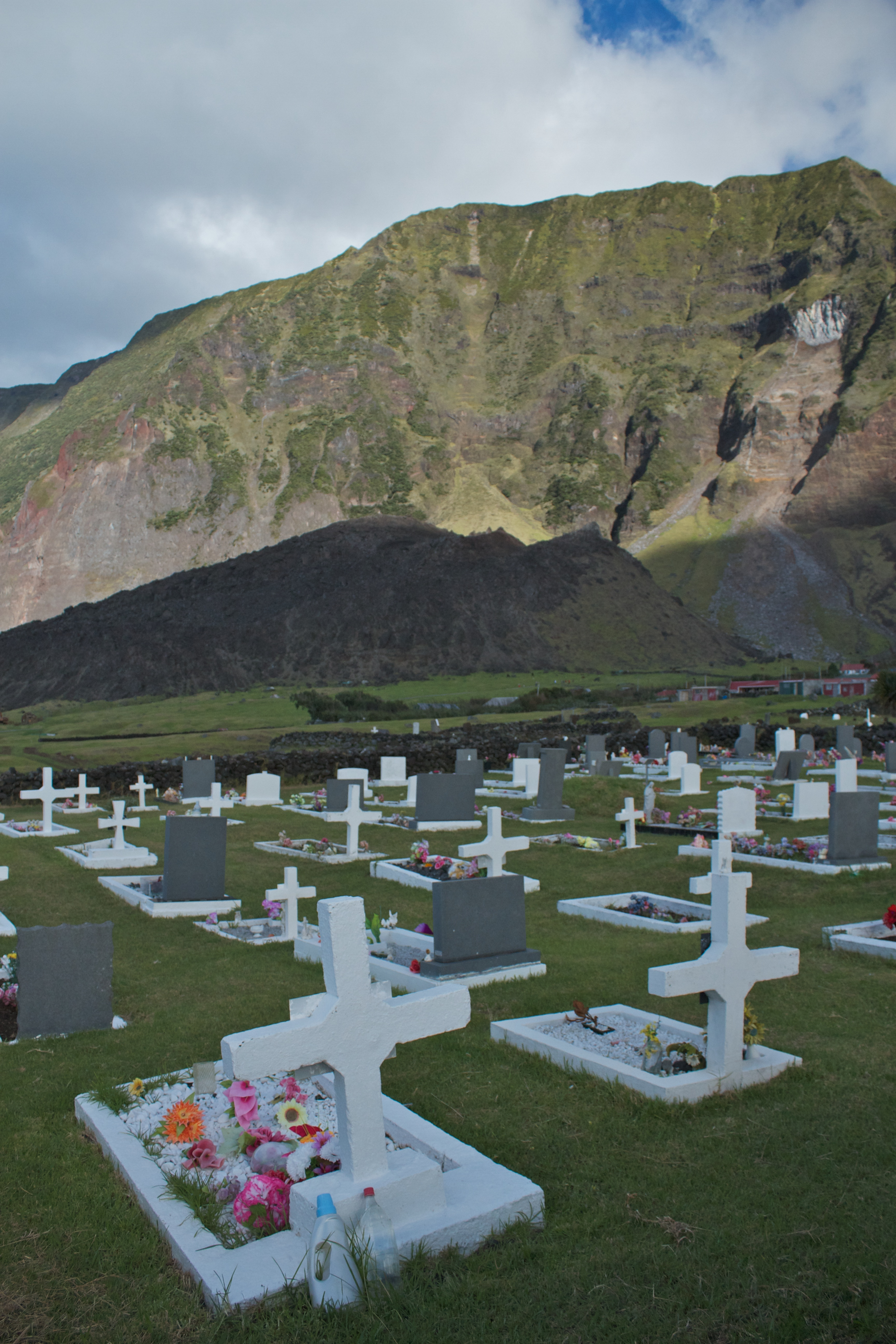 Tristan Graveyard